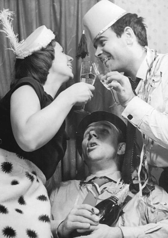 Neujahrsfest Zentralbild Quaschinsky 18.12.1957 Sylvester bei Werner Lierck. In der Küche! Es muß aber ziemlich schlimm gewesen sein, denn er ergab sich dem Alkohol und so kann man es seiner Frau nicht übelnehmen, wenn sie sich inzwischen mit Edwin Marian beschäftigt.